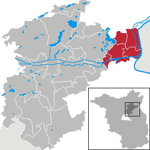 Amt Oderberg in Brandenburg (Country) - District Barnim